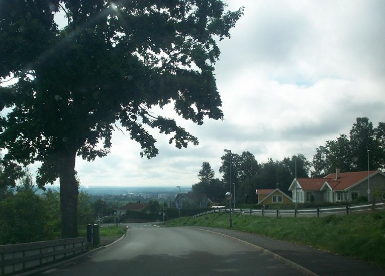 Utsikt från Dälderna (lerdalavägen)